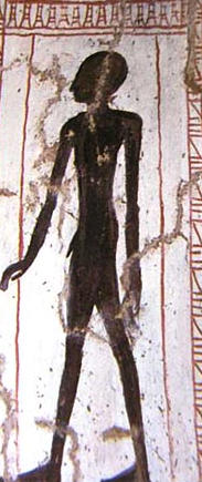 Qədim Misirdə insanın beş ruhundan biri Şuit